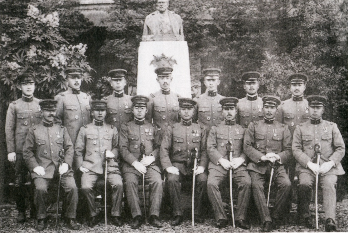 陸大30期卒業生一同。中央は石原。